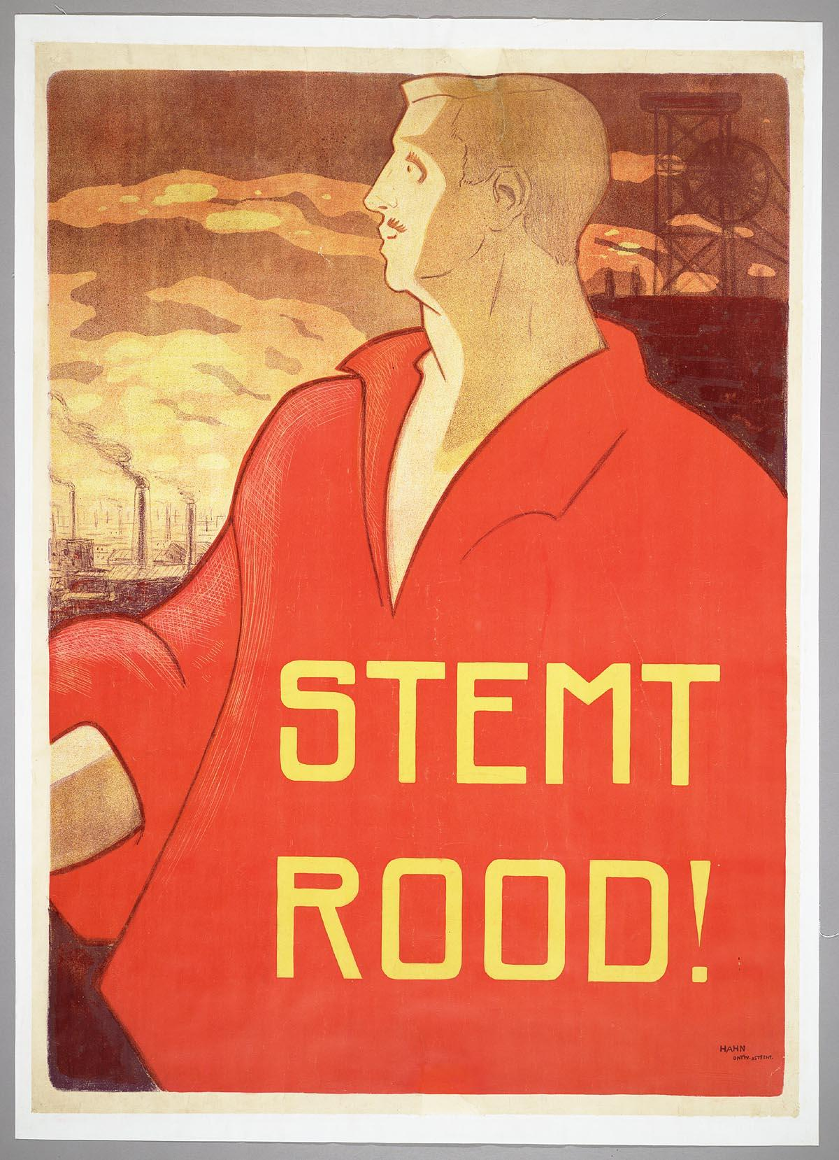 Affiche: Landelijke verkiezingen, SDAP, 1913